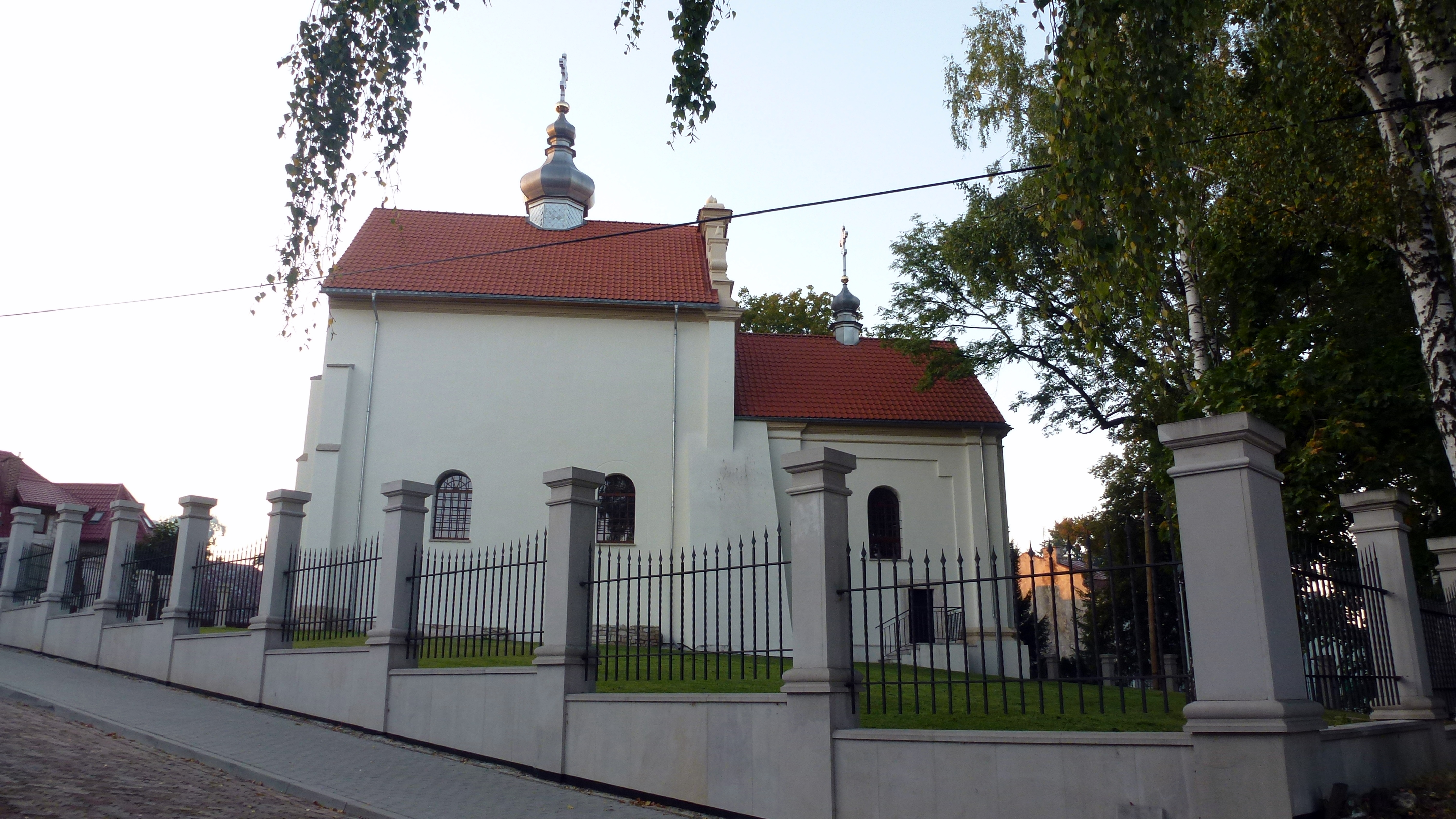 Greek Catholic church in Szczebrzeszyn